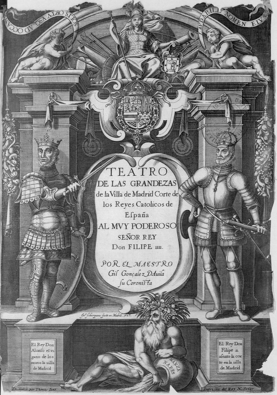 Gil González Dávila, Teatro de las grandezas de la villa de Madrid Corte de los Reyes Católicos de España..., En Madrid, por Thomas Iunti, 1623. Ilustración de portada firmada I. Schorquens, fecit en Matriti 1623. Ejemplar de la Universidad de Sevilla.